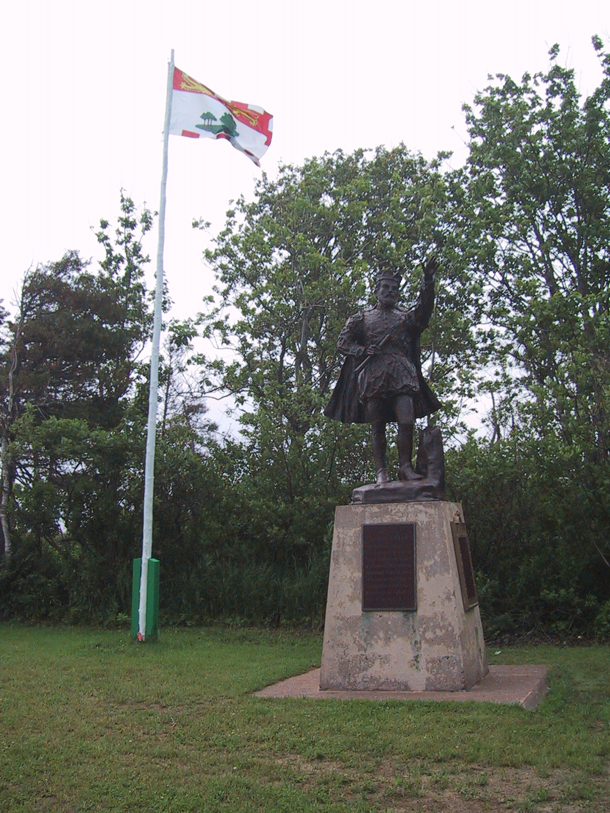 Jacque Cartier Provincial Park, PEI, Canada